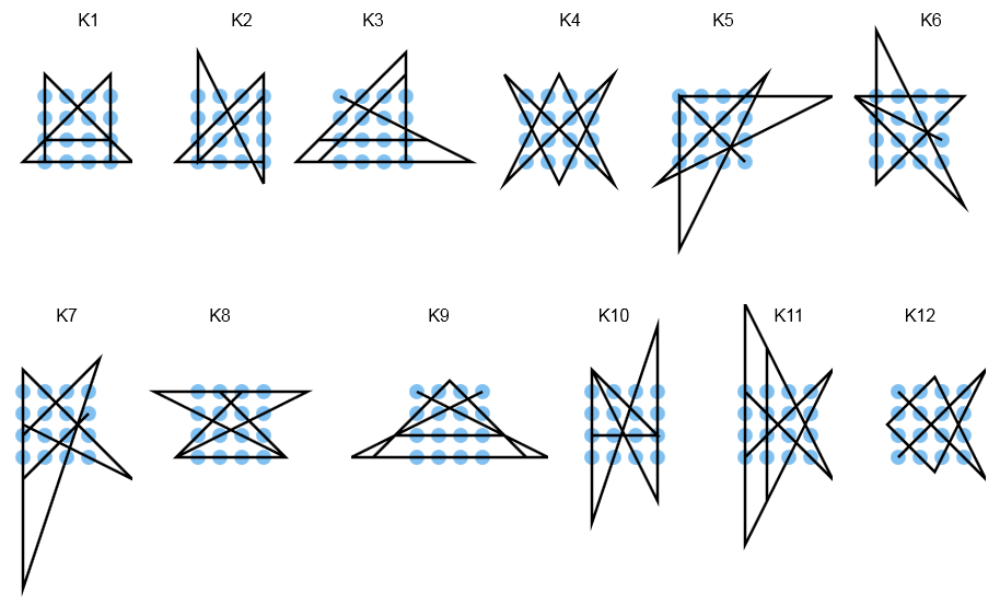 Lösungskategorien des 16 Punkte Problems